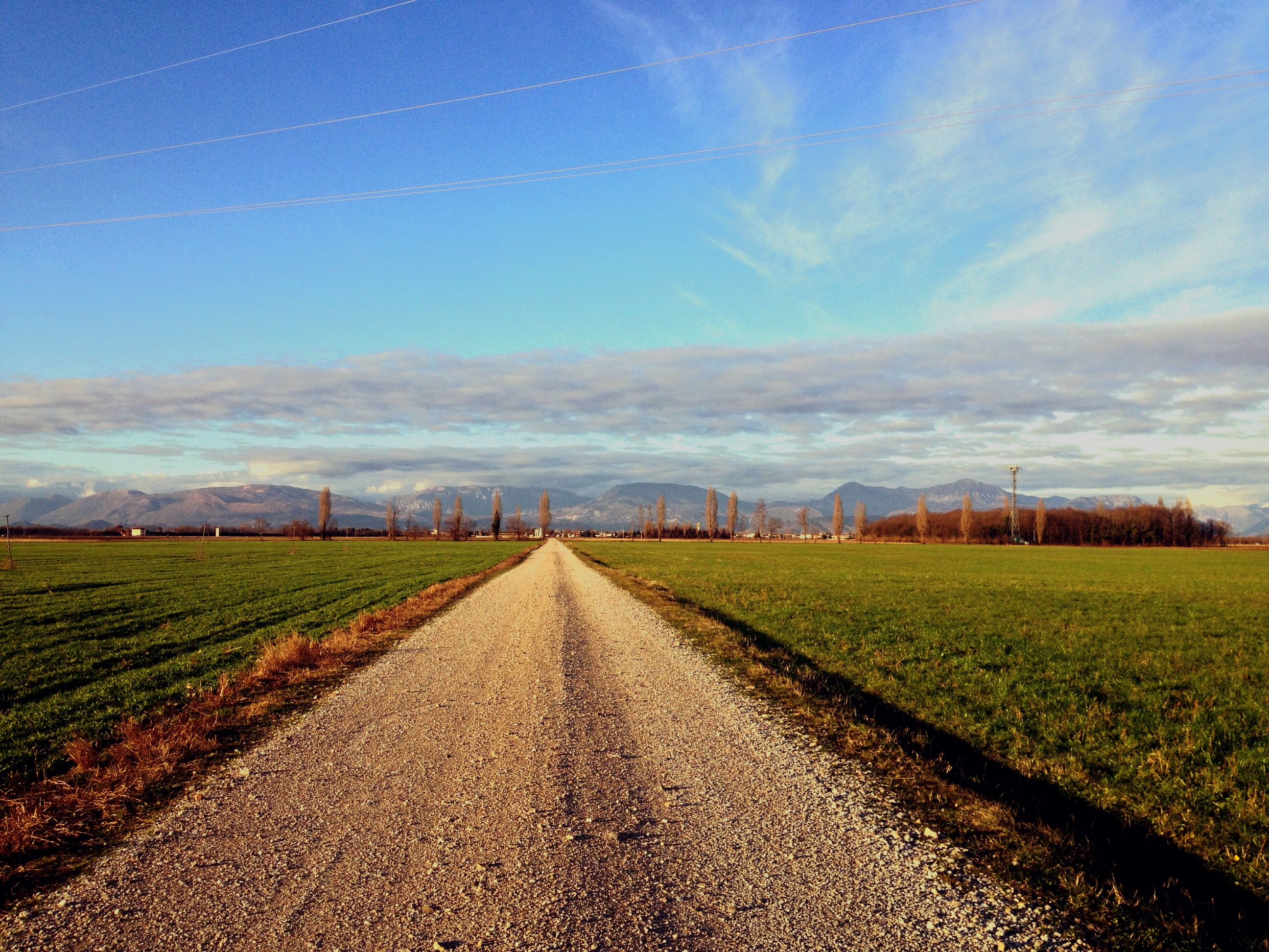 Foto di F. Curridor. Flaibano, panorama autunnale da loc. Sottoselva - visuale Nord